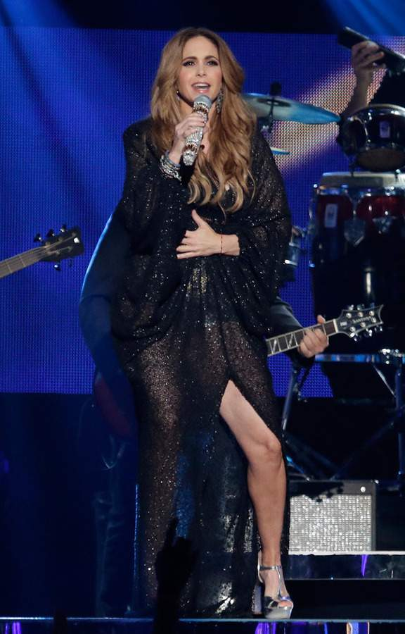 Cantora, Compositora, atriz e apresentadora Lucero a Noiva da América!